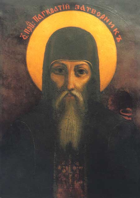 Saint Pancras, hieromonk of Kyiv Caves Monastery, Ukraine (13-th century) Панкратій затвірник - XIII ст. Ієромонах Печерського монастиря. Преподобний. Пам'ять 10 вересня н.ст. і 22 лютого. Відомо, що прп. Панкратій був ієромонахом Лаври і мав дар чудотворення: зціляв хворих молитвою, постуванням і помазанням єлею. Його мощі спочивають у Дальніх печерах.